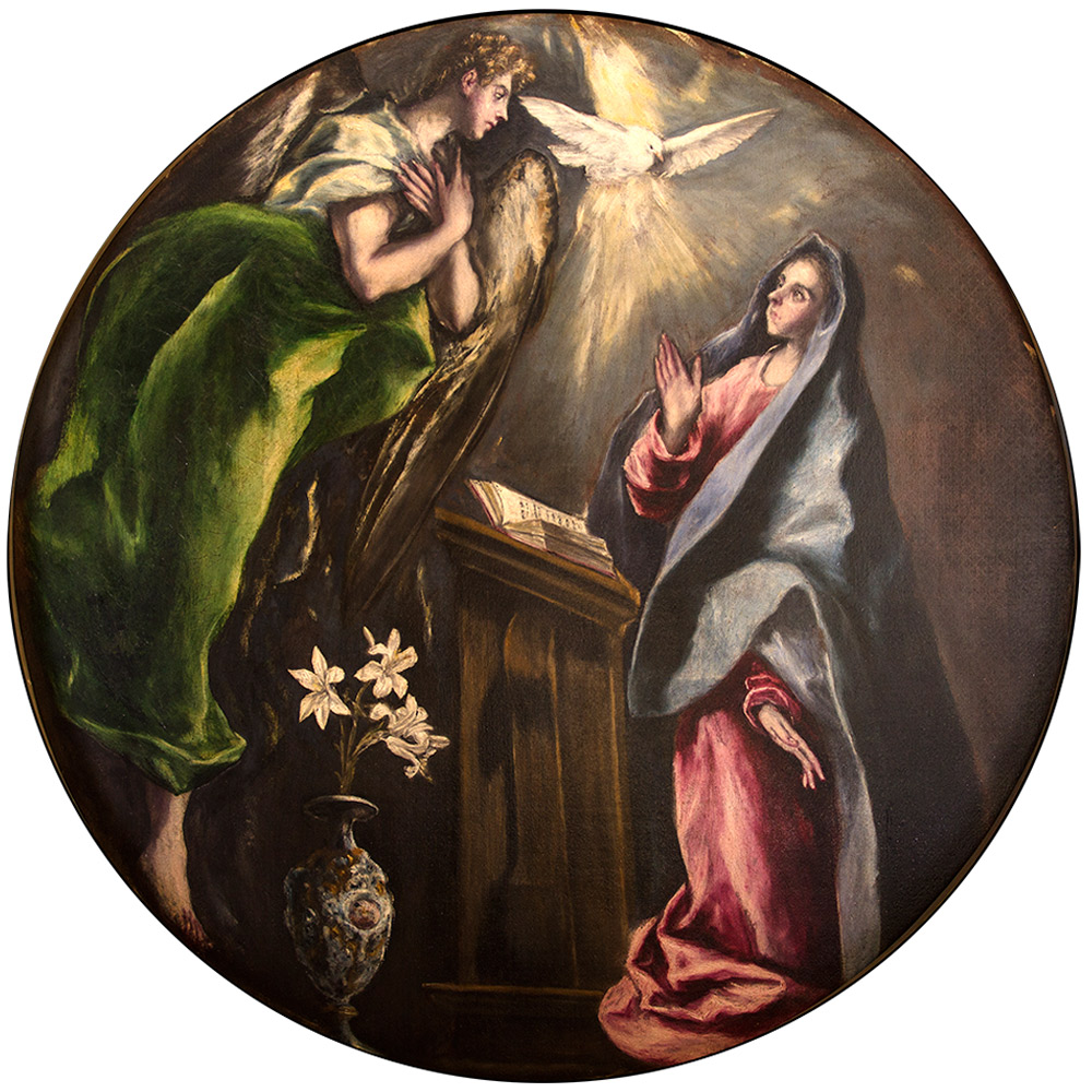 La obra, titulada La Anunciación representa el momento en que el Arcángel San Gabriel anunció a la Virgen María que sería la madre de Jesucristo, el Mesías. Es una simplificación de la que realizó años antes para el Colegio de Doña María de Aragón. Sobre un fondo neutro coloca a las dos figuras principales de la escena, el arcángel en el lado izquierdo adaptándose a la curvatura del lienzo y la Virgen a la derecha sorprendida mientras oraba. Como eje de la composición se encuentra el atril y la paloma del Espíritu Santo que baja con toda su gloria y se convierte en foco iluminador de la escena. Encontramos en esta peculiar composición una diagonal marcada por los ojos de los protagonistas y la paloma simbólica.